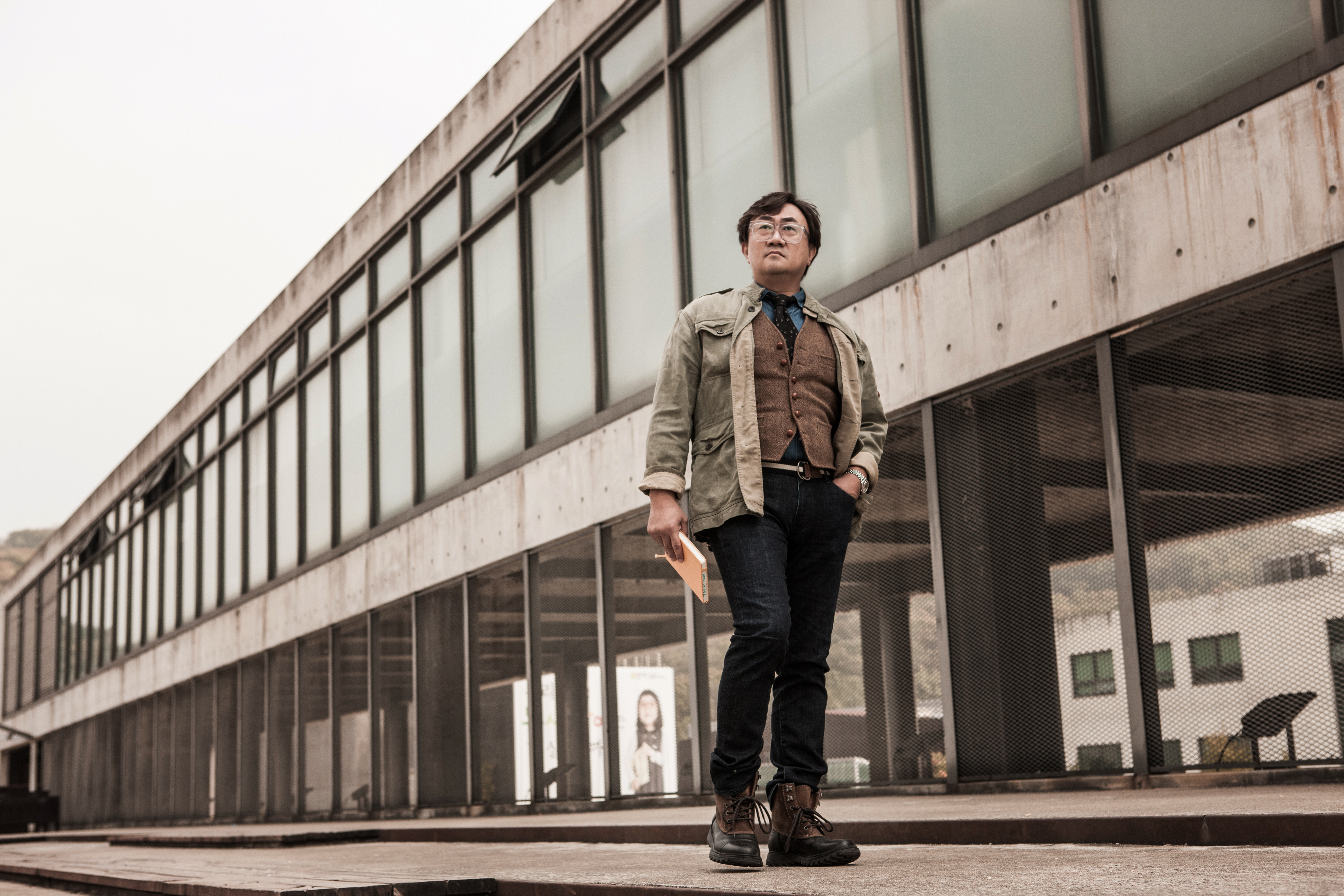 주기윤프로필